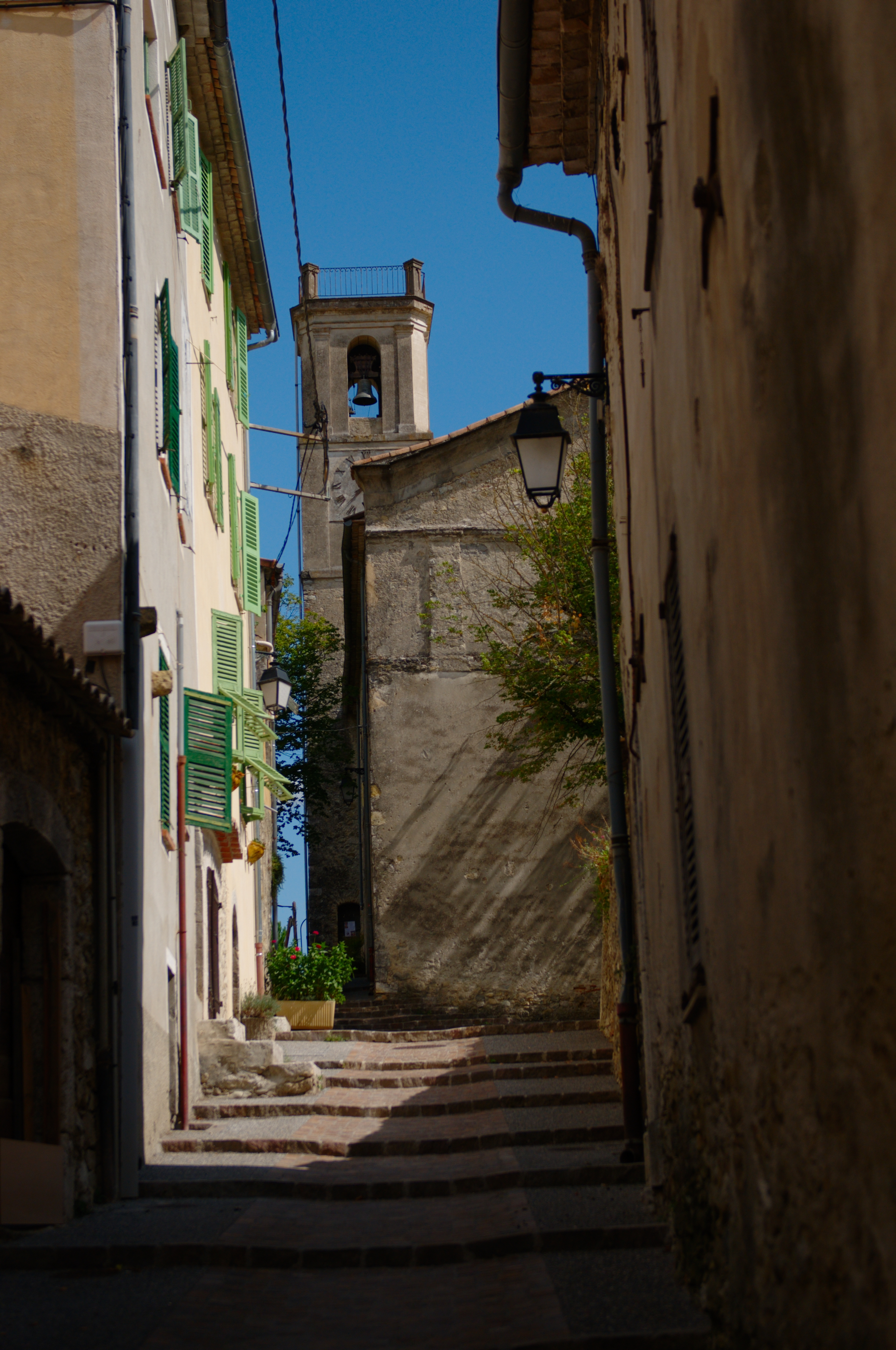 Photo de Roquesteron